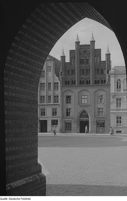 Original image description from the Deutsche Fotothek Stralsund. Blick durch einen Torbogen des Rathauses auf das Wulflamhaus, Alter Markt 5